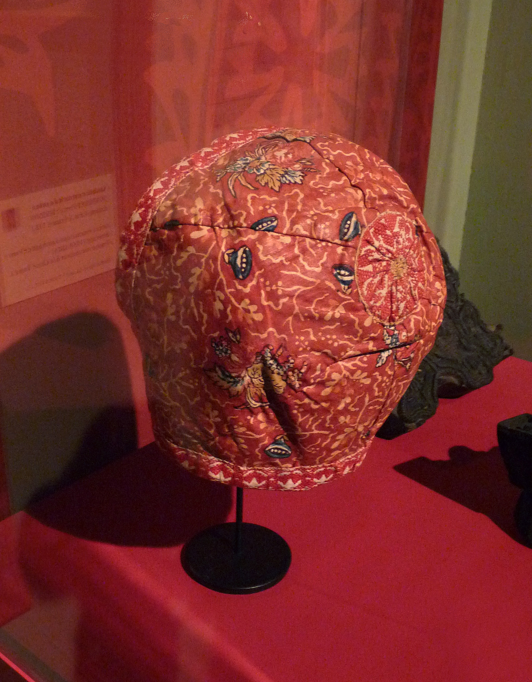 Béguin d'enfant en indienne rouge. Coton, Inde, Côte de Coromandel, 18e siècle. Musée de la Compagnie des Indes (Lorient)